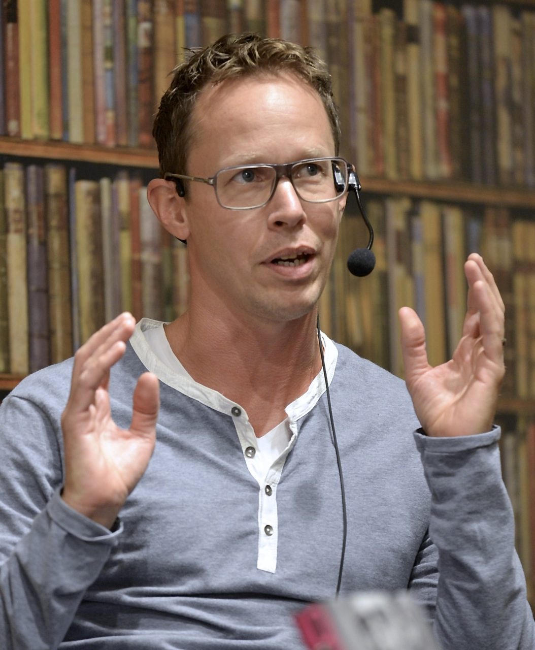 Markus Lutteman samtalar om den nya boken "Per Holknekt 1960–2014" på Akademibokhandeln på Mäster Samuelsgatan i Stockholm den 4 september 2014.